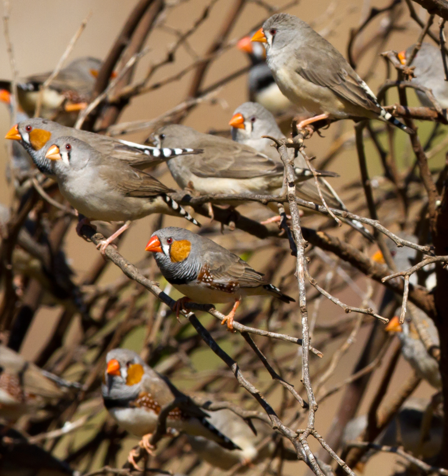 Chaos at drinking time